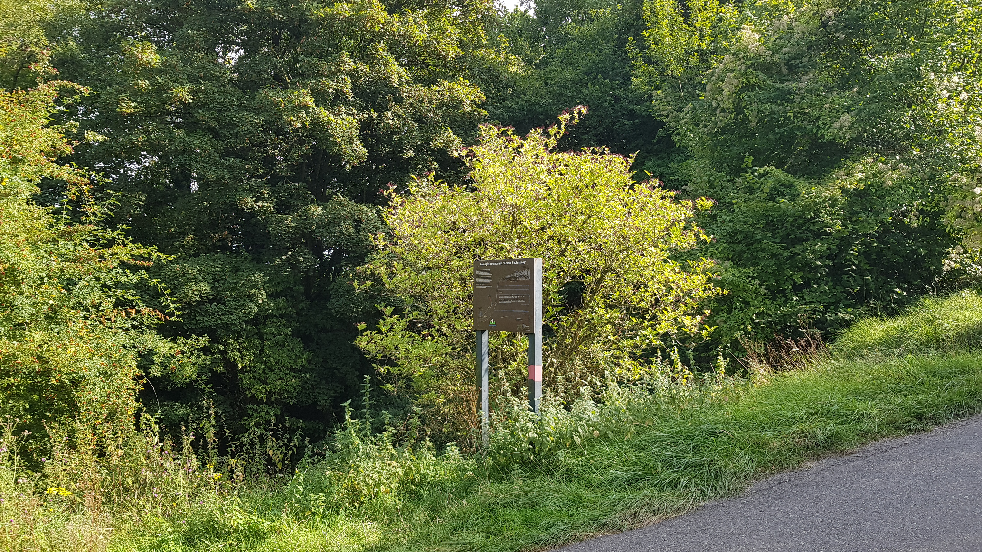 Groeve Keutenberg, Schin op Geul, Nederland